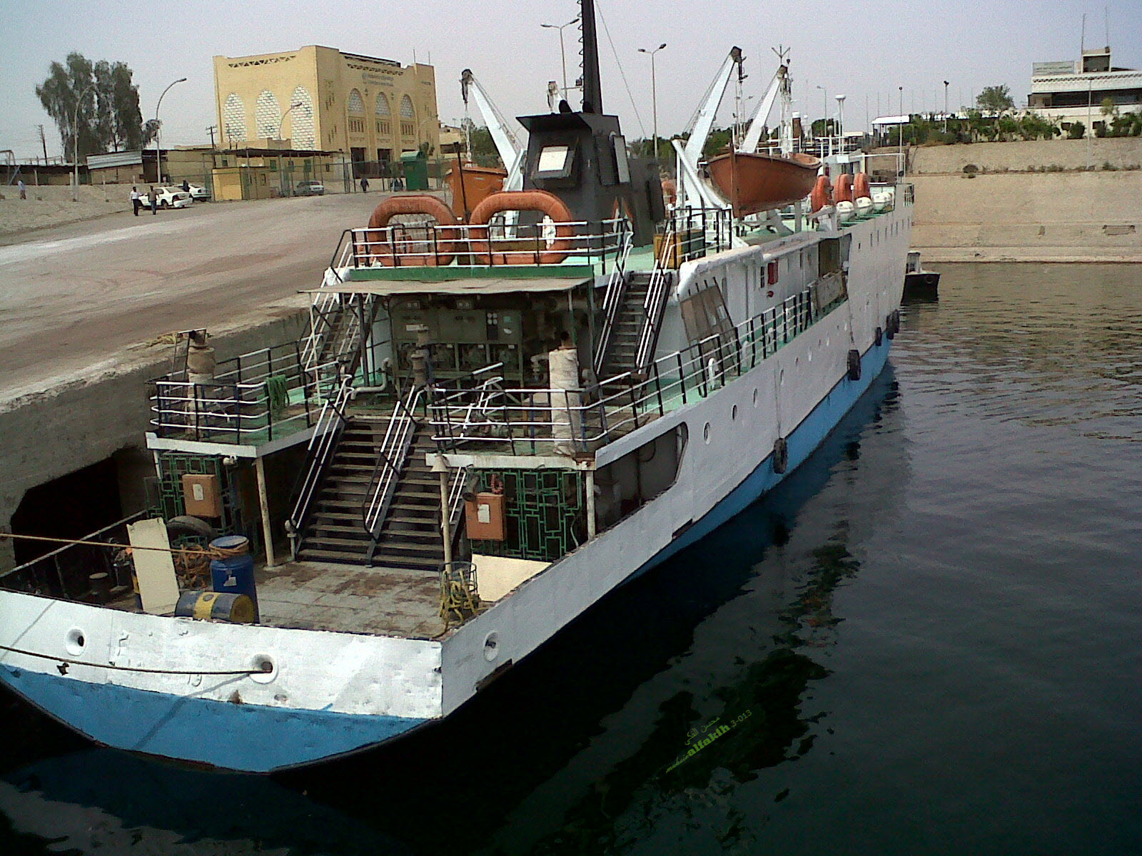 العبارة ساق النعام ترسو في ميناء أسوان النهري